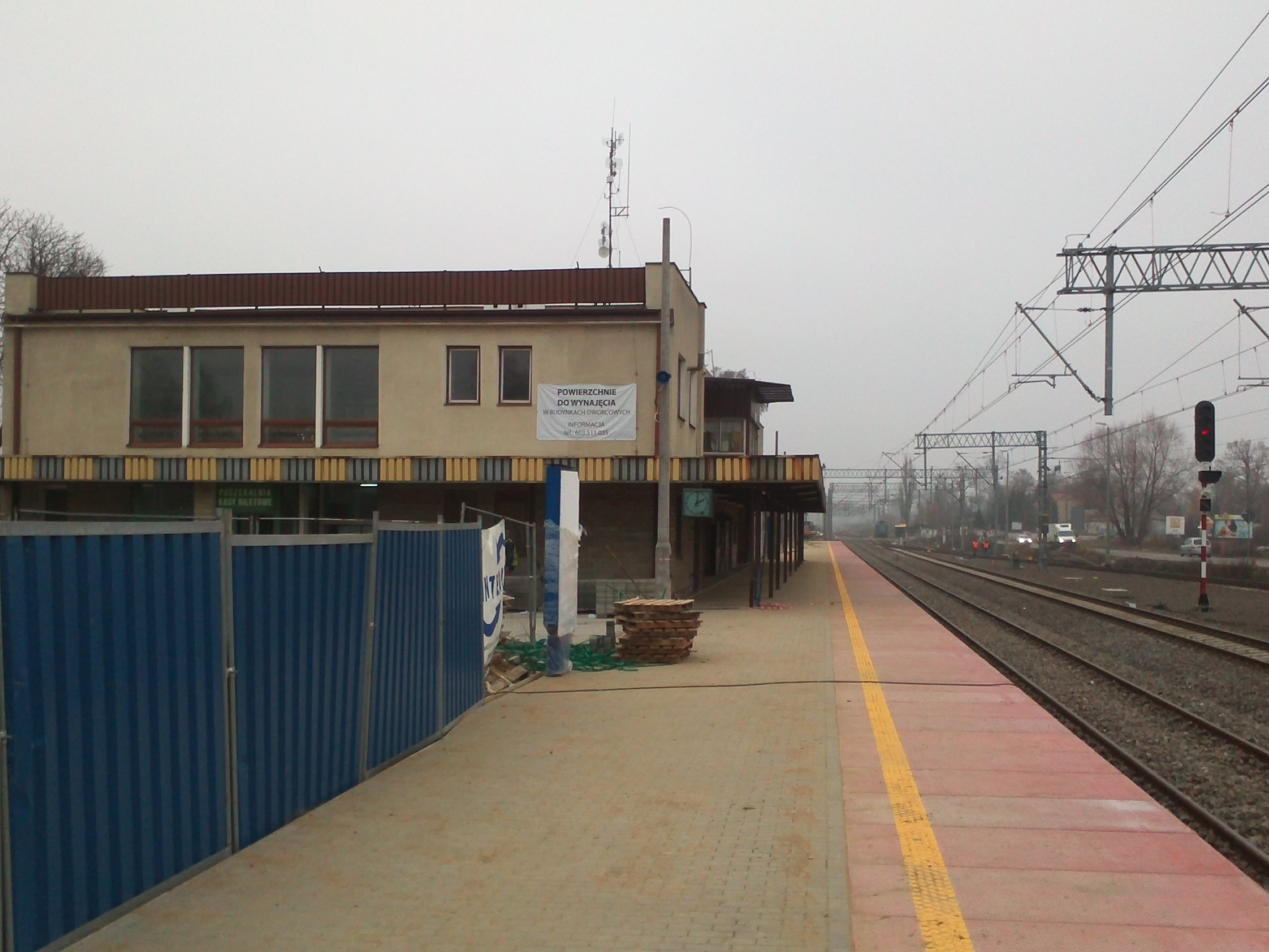 Dworzec obecnie w trakcie remontu. Budowane jest przejście podziemne i nowe perony.